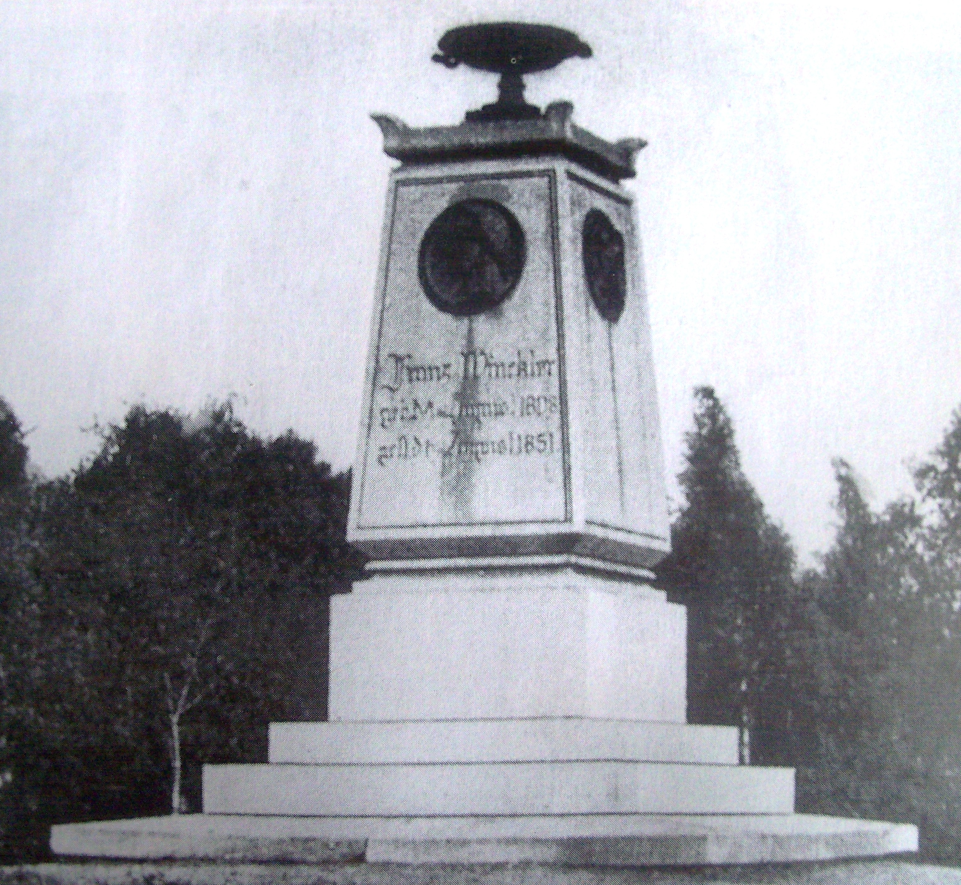 Theodor Erdmann Kalide: niesitniejący pomnik Franza von Wincklera w Katowicach, w dworskim parku (obecnie park Powstańców Śląskich obok Pomnika Powstańców Śląskich)